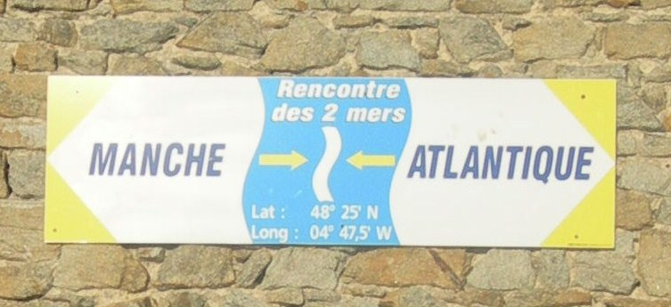 Écriteau de la pointe de Corsen Plouarzel, France